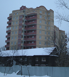 улица Пионерская, дом 10